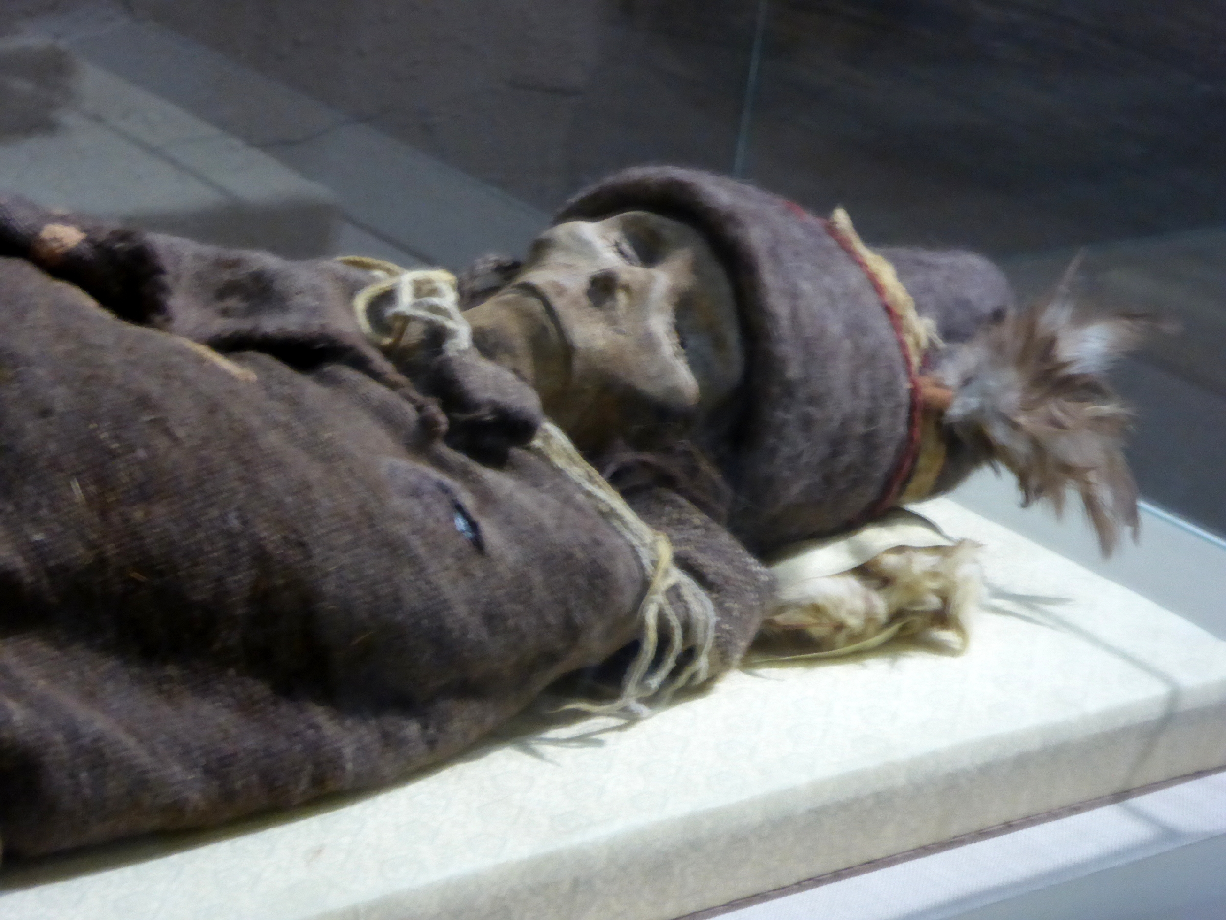 Xinjiang Uygur Autonomous Region Museum Urumqi Xinjiang China 新疆 乌鲁木齐 新疆维吾尔自治区博物馆